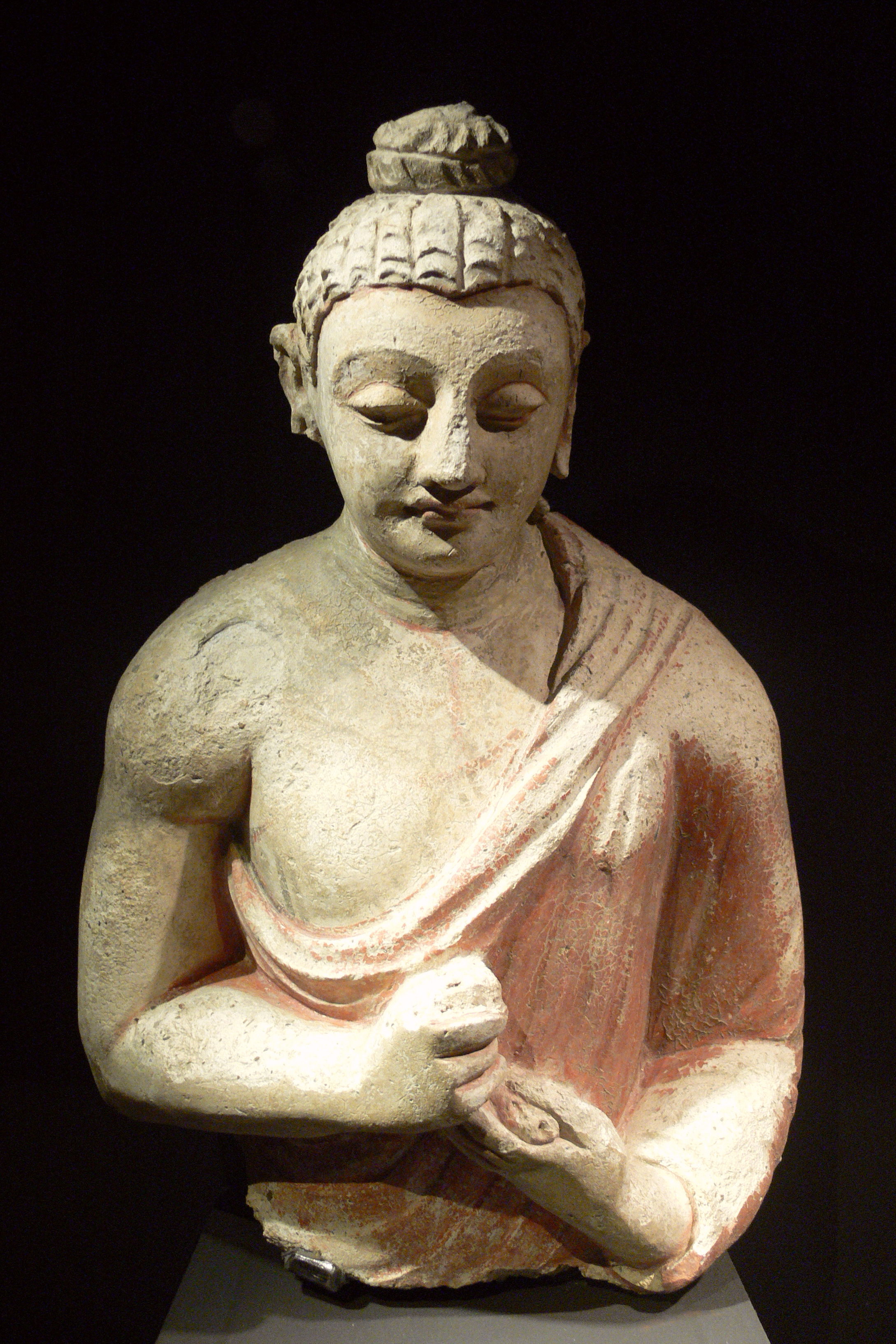 Buddhafigur (ehemals sitzend), Spät-Kushana, 4. Jh.; Linden-Museum, Stuttgart